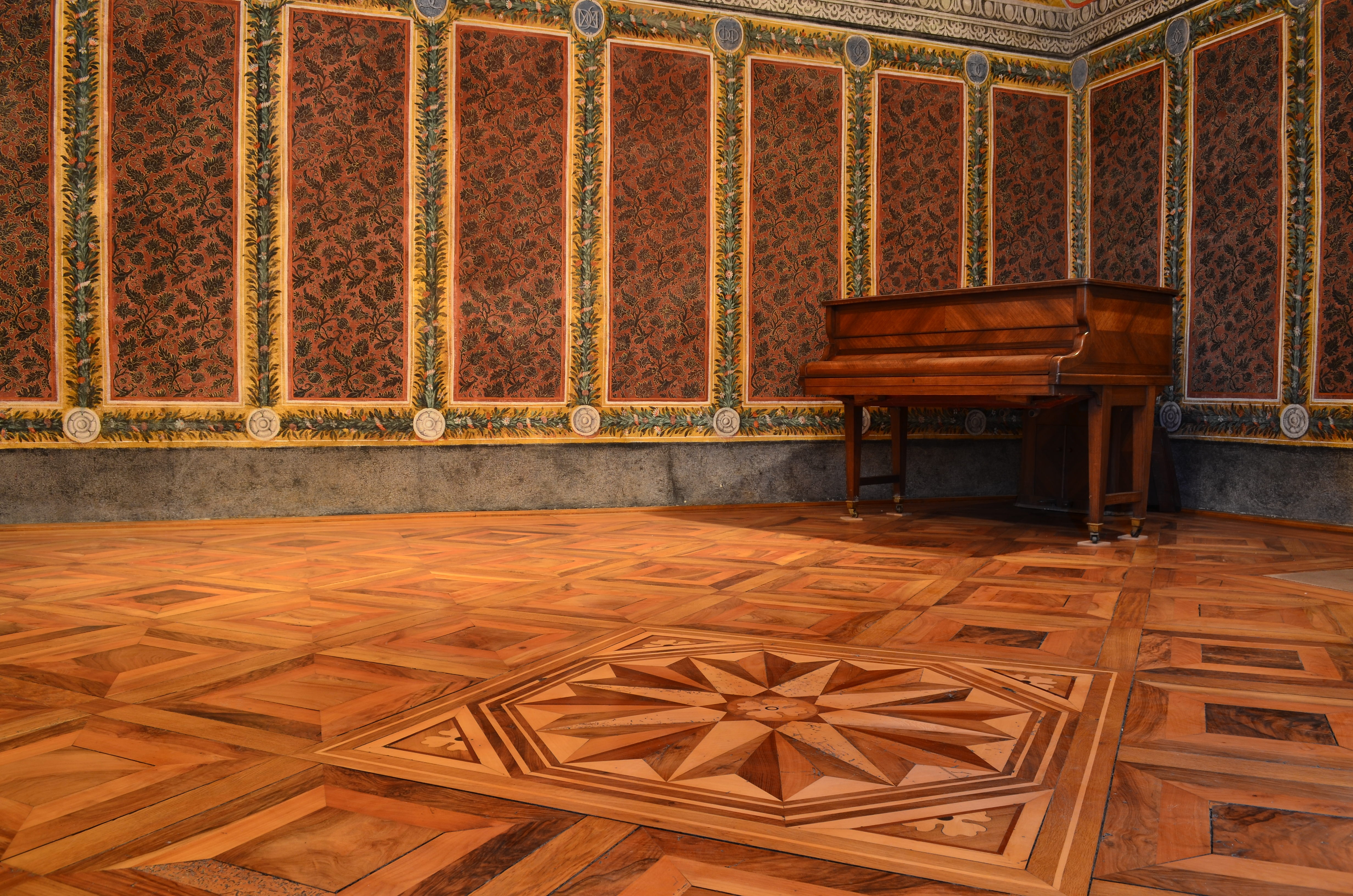 Salle des Brocarts de l'Hotel de Ville de Grigny (Rhône). Peintures murales classées. Crédit: G.MOULINphotographies©